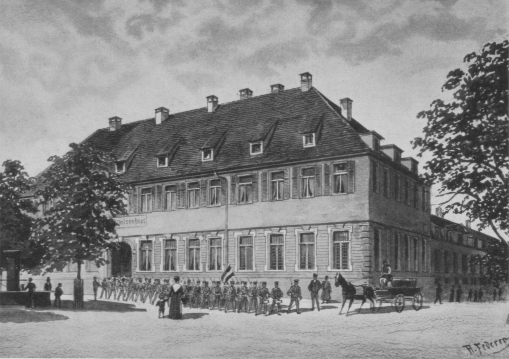 Stuttgart, Altes Waisenhaus an der Planie-Ecke